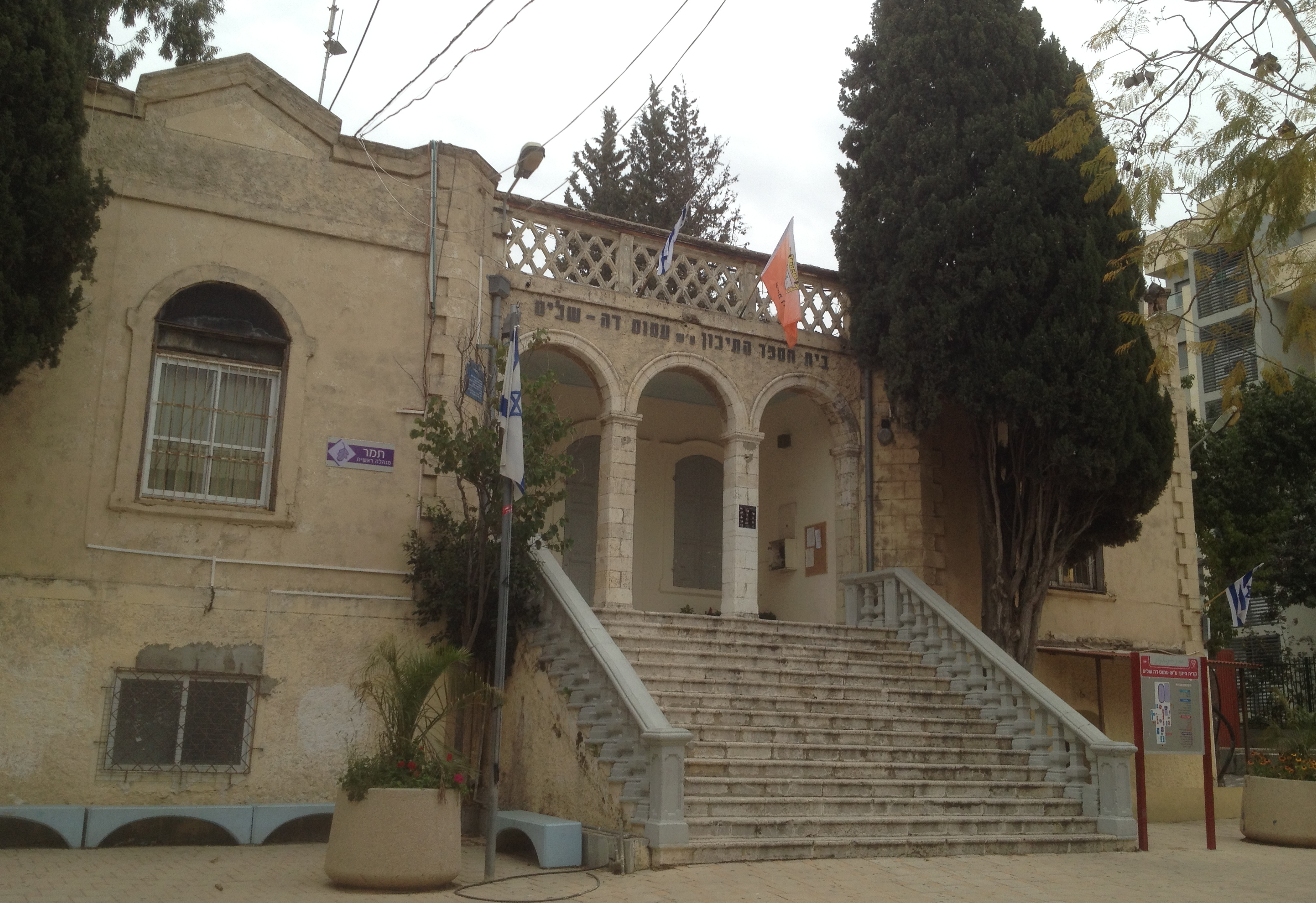 בית סלוצקין, רחוב מנוחה ונחלה 58, רחובות כיום חלק מביה"ס התיכון ע"ש עמוס דה שליט